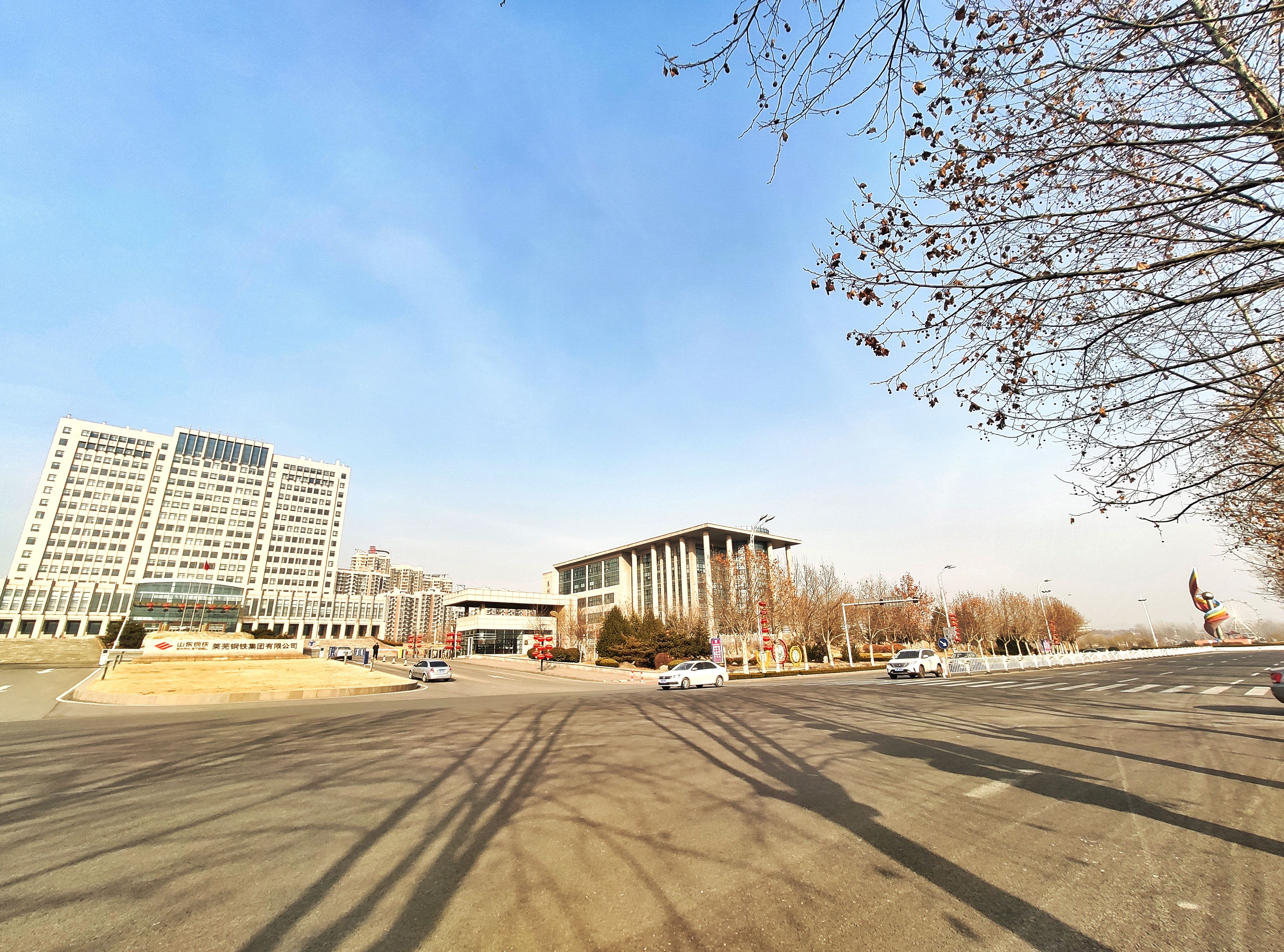 钢城区府前大街莱钢集团办公楼